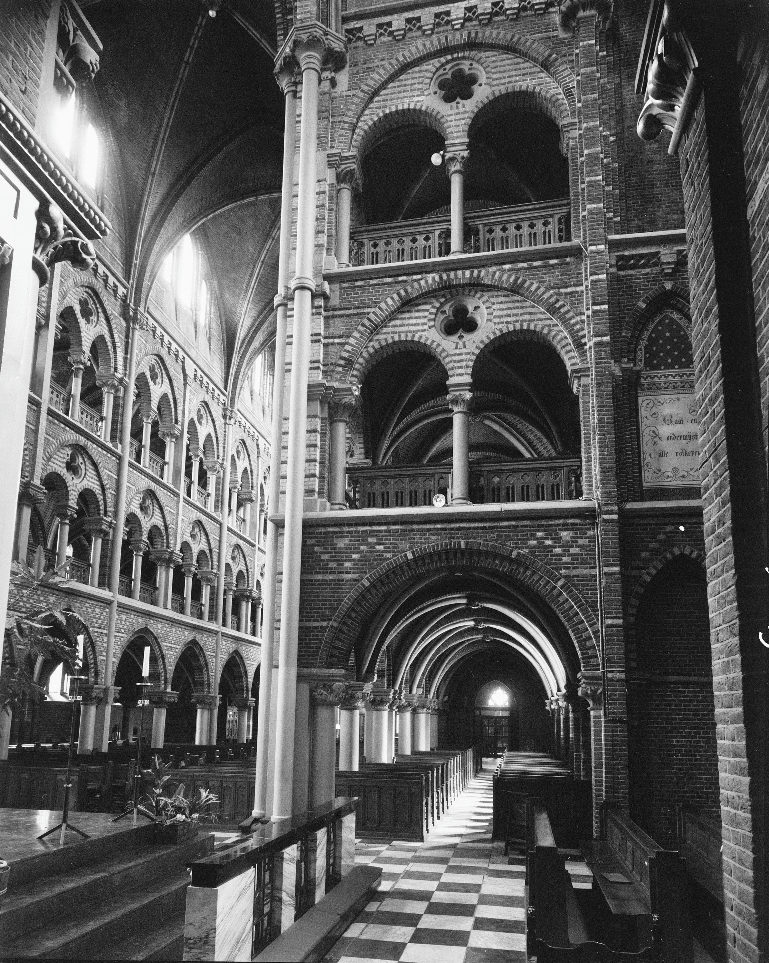 R.K.Kerk "De Posthoorn": interieur Haarlemmer Houttuinen